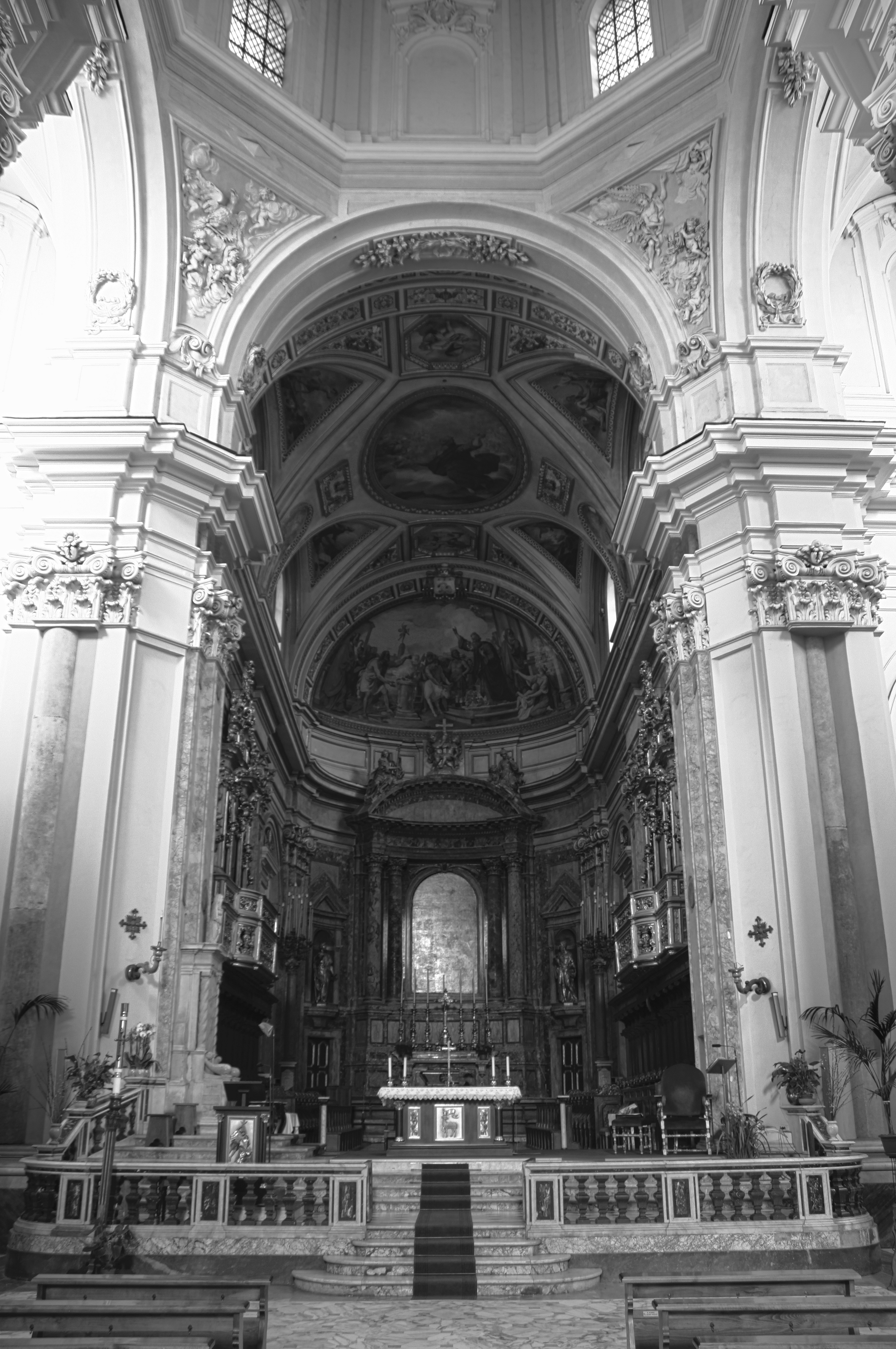 Interno del Duomo di Aversa (CE), Italia. Navata centrale verso l'altare.